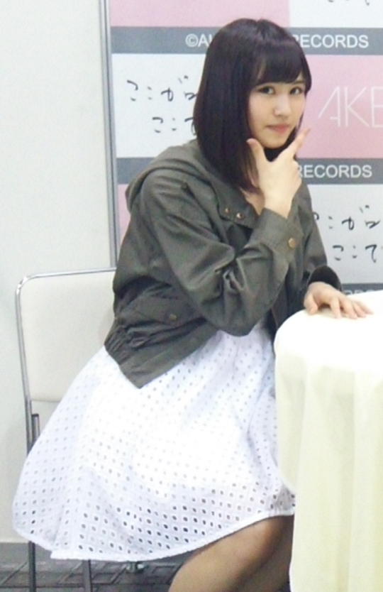 AKB48 6thアルバム「ここがロドスだ、ここで跳べ！」劇場盤発売記念大写真会